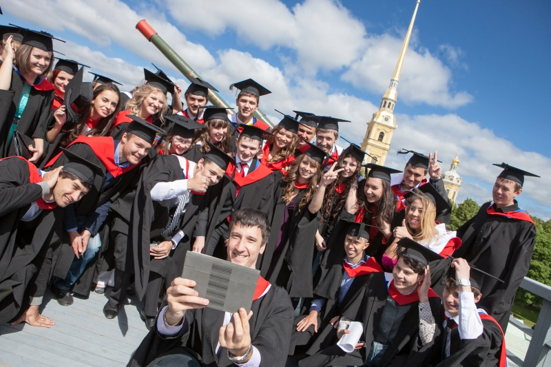 Выпускники Университета ИТМО в Петропавловской крепости